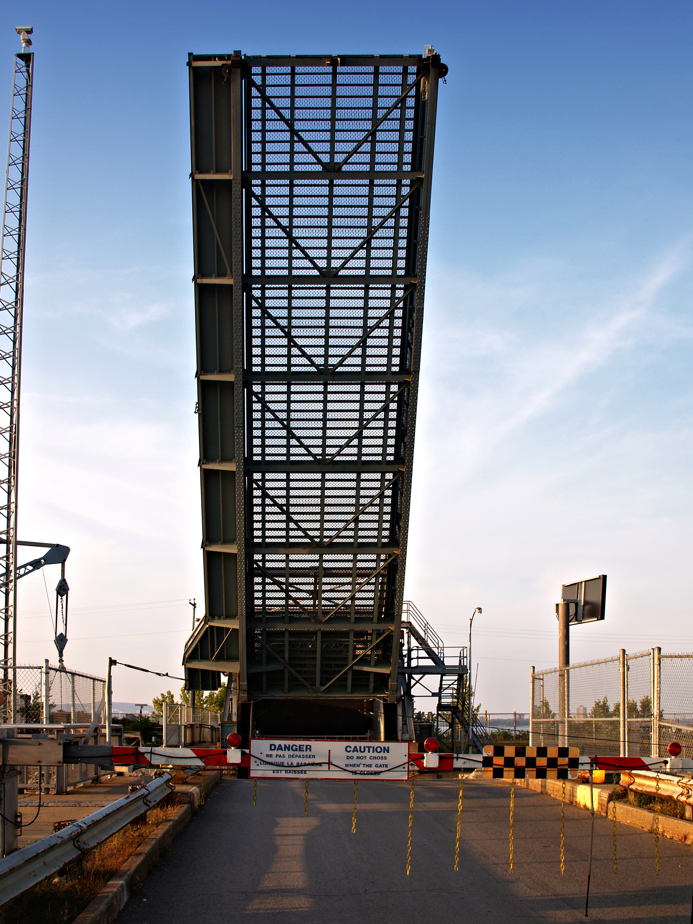 Sainte-Catherine (Québec) - Pont de l'écluse Côte Sainte-Catherine